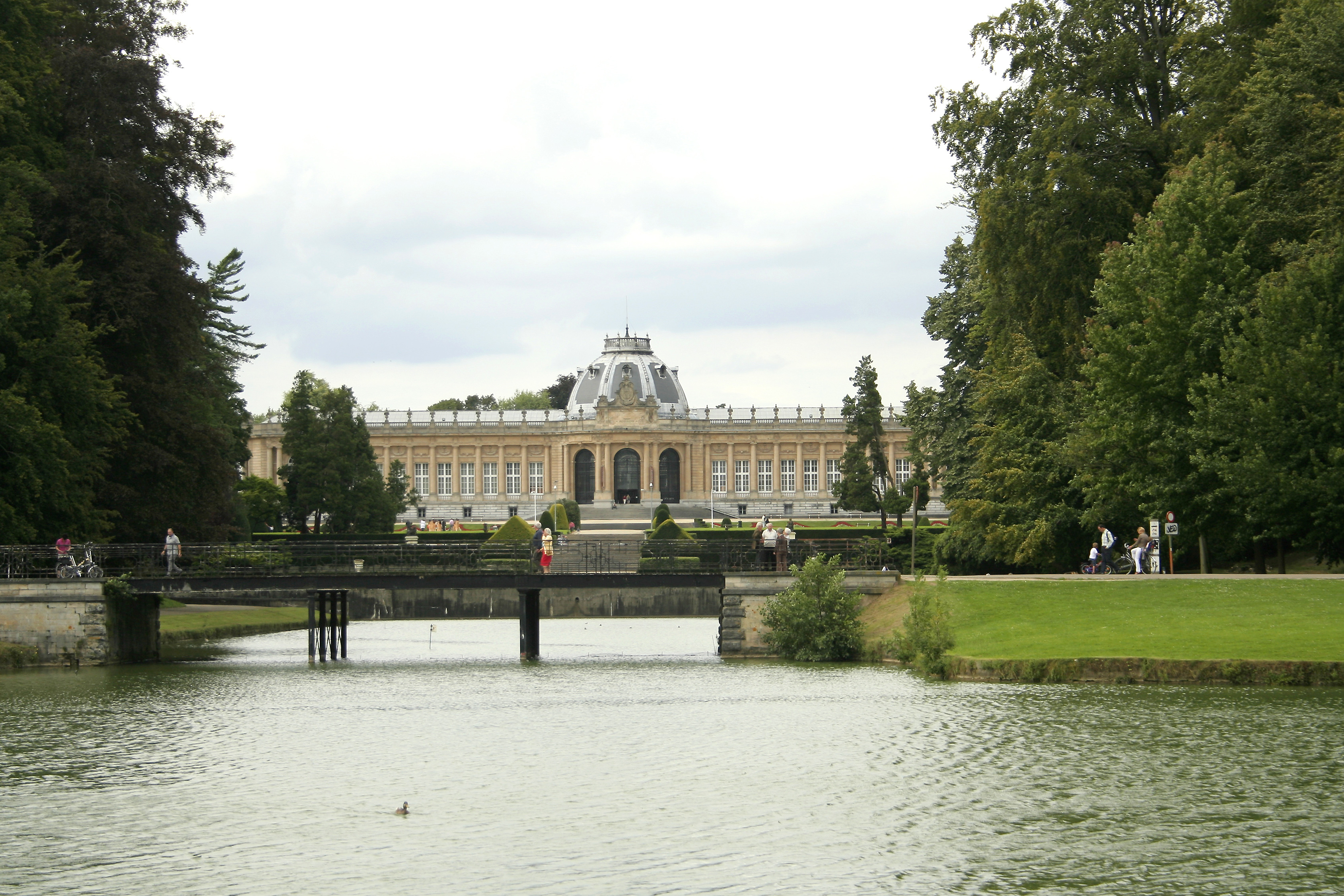 Tervueren, le Musée royal de l'Afrique centrale vu depuis la rive sud-est de la pièce d'eau centrale du parc.